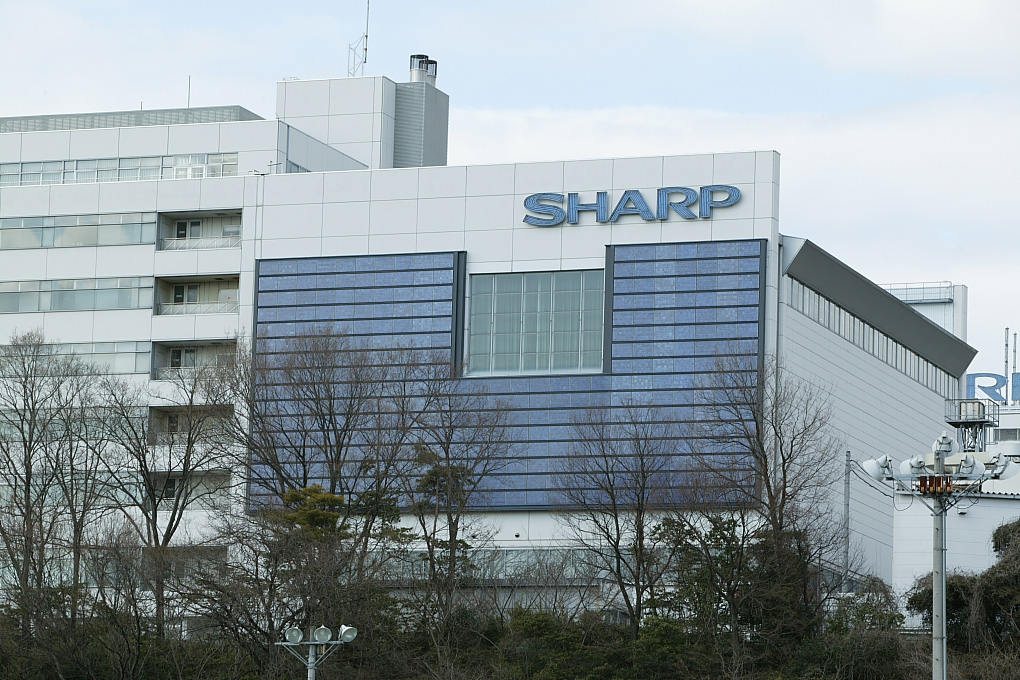 Sharp Sogo Kaihatsu Center